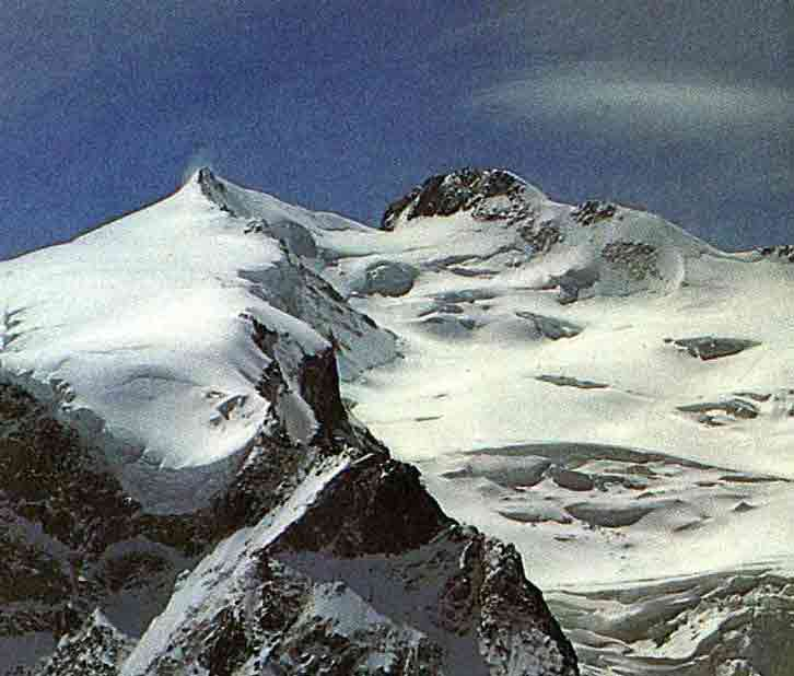 Monte Rosa da archivio